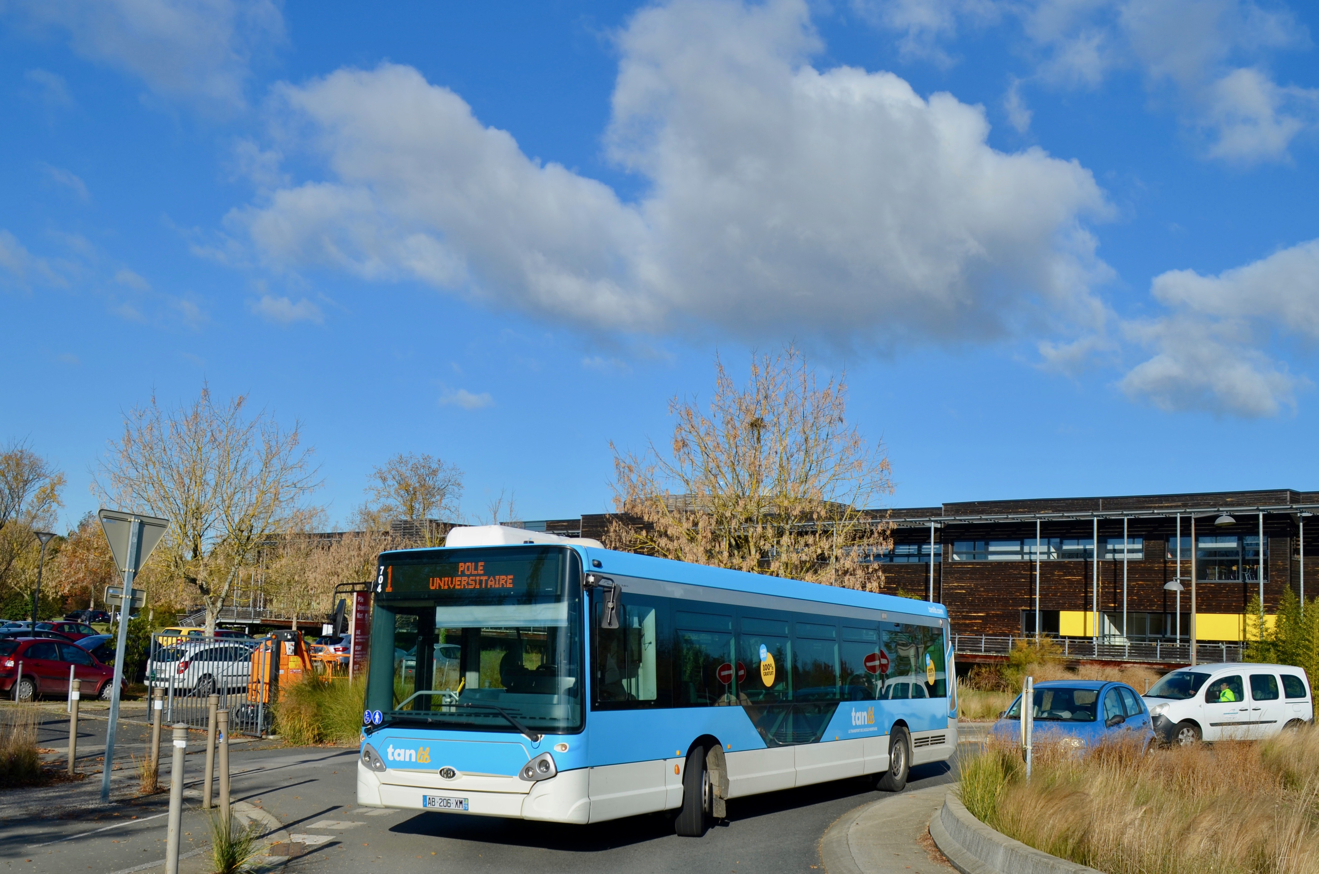 Bus de la ligne 1 du réseau Tanlib à Niort.